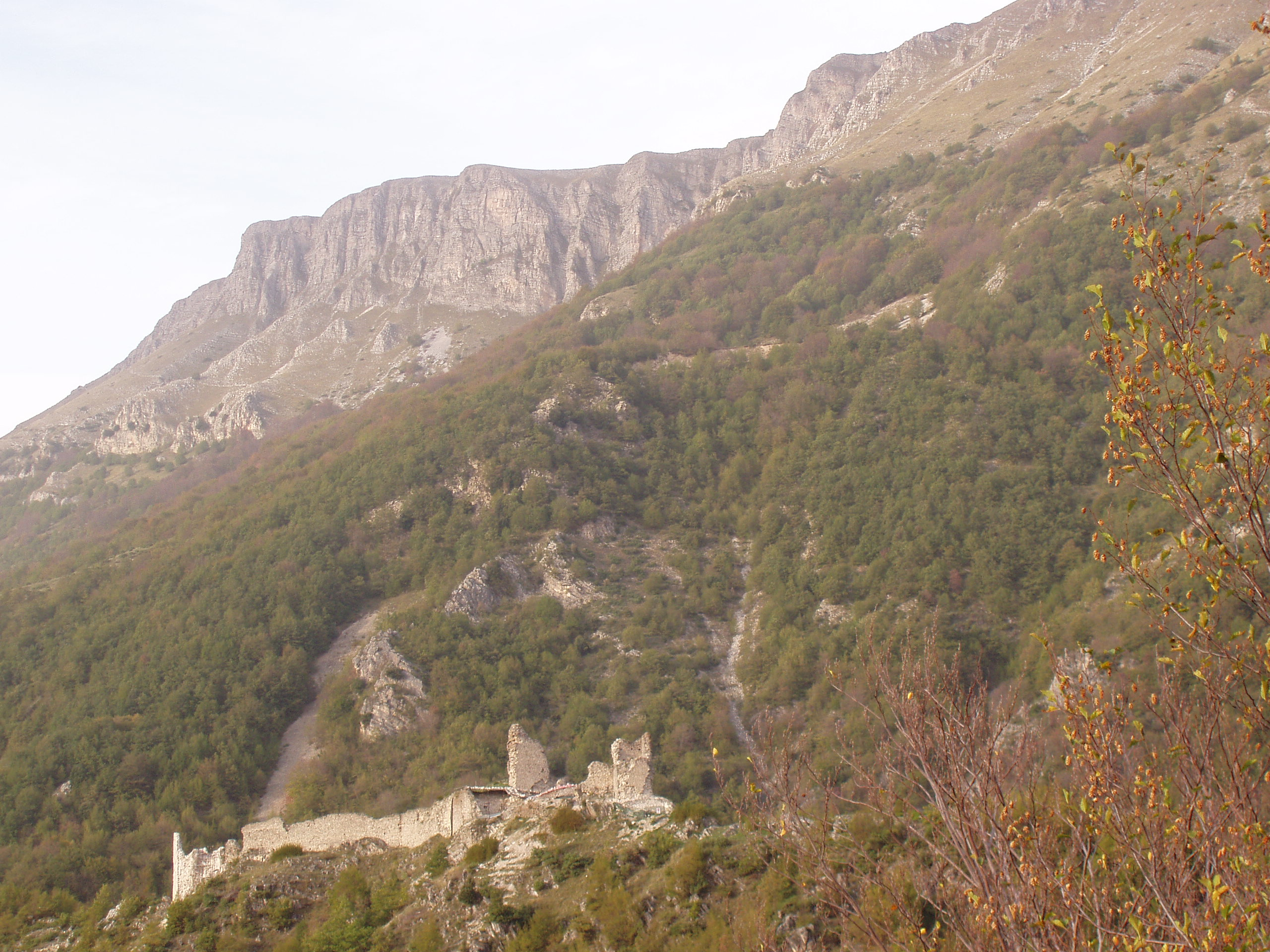 Castel Manfrino nei pressi di Macchia da Sole (comune di Valle Castellana, Teramo